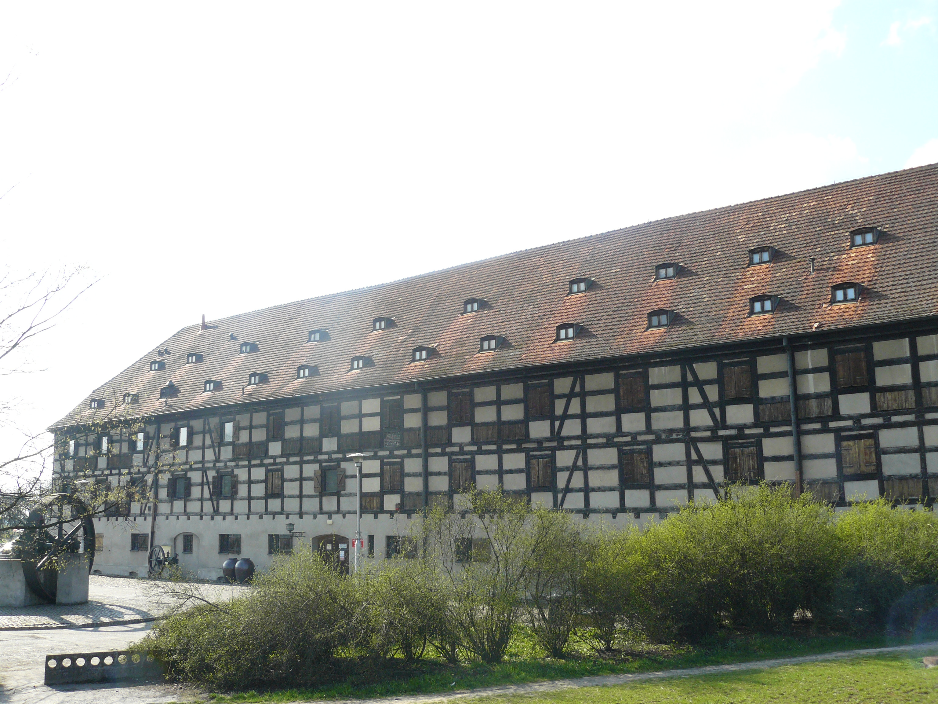 muzeum Spichlerz